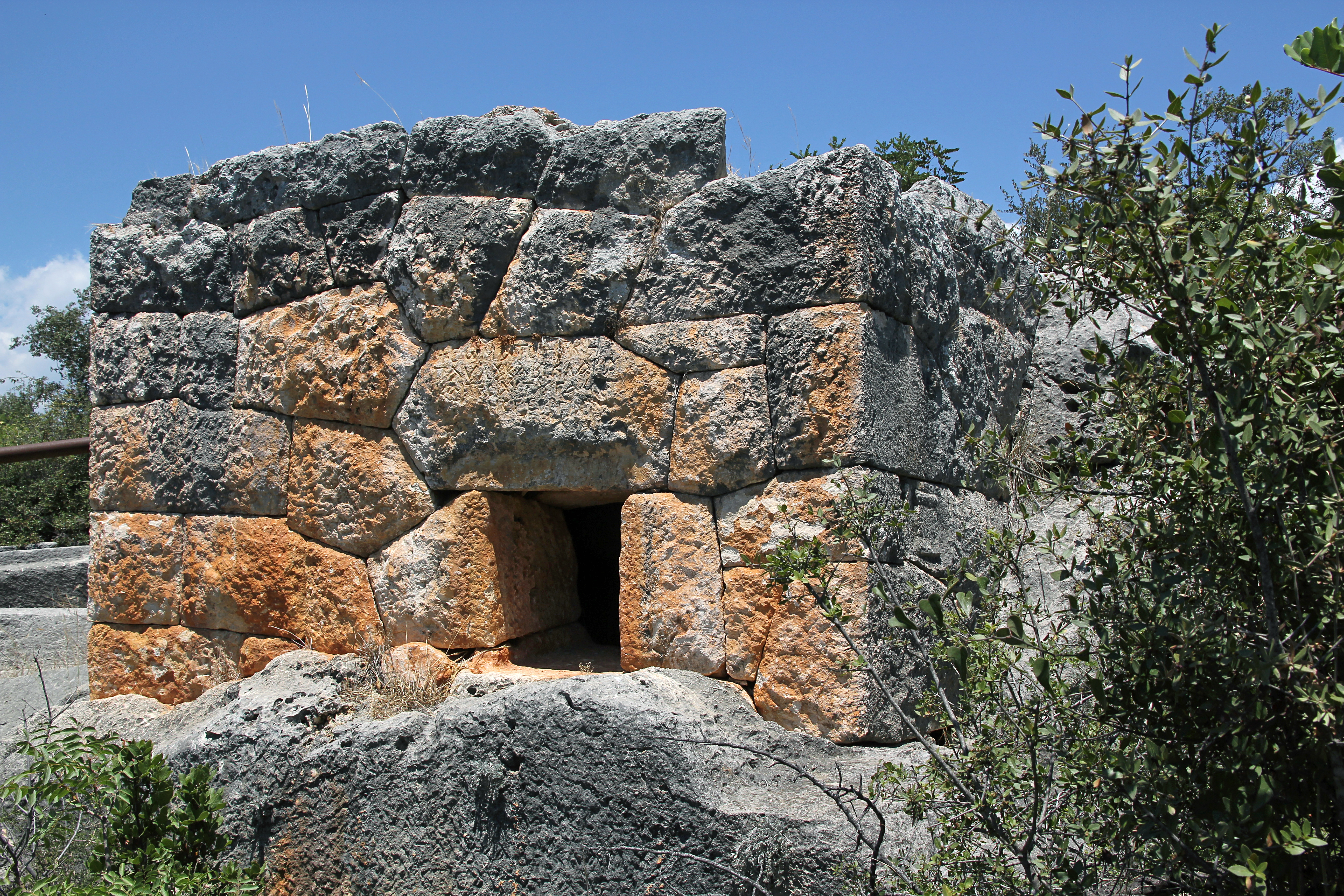 Korykos, archäologischer Fundort in der Südtürkei, polygonales Grabhaus in Nekropole II, genannt Zyklopengrab